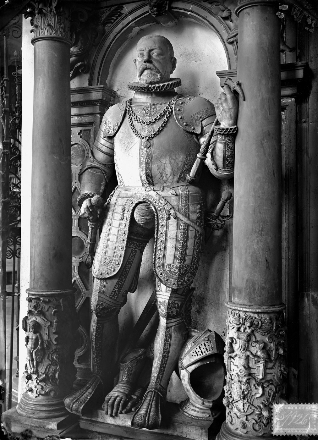 Wandgrab des hessischen Landgrafen Ludwig IV. Testator (gest. 1604) und seiner Gemahlin Hedwig von Württemberg (gest. 1590) in der Lutherischen Pfarrkirche in Marburg geschaffen 1590-93: Statue des Landgrafen. Siehe Landesgeschichtliches Informationssystem Hessen (LAGIS)